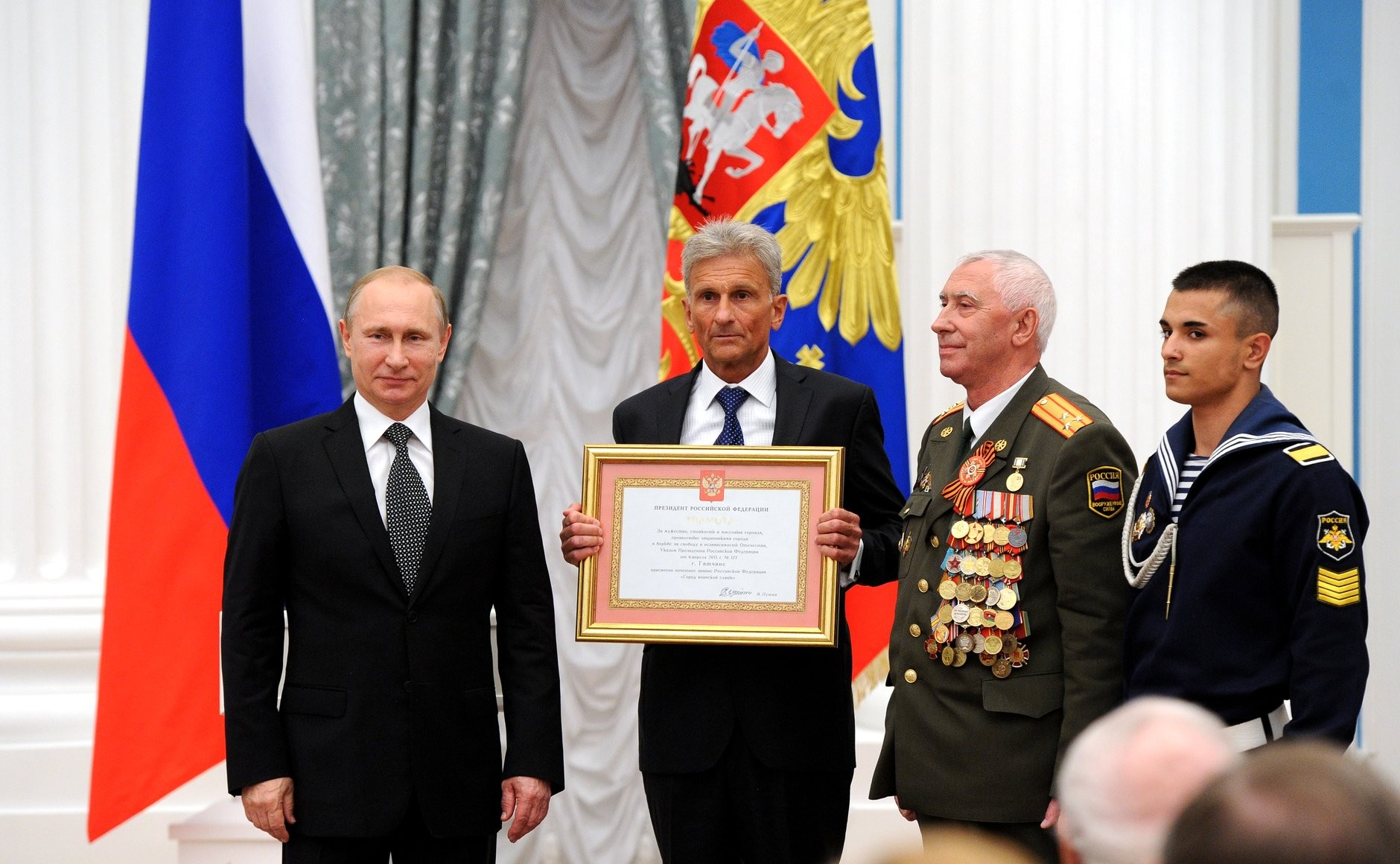 Вручение грамот о присвоении звания «Город воинской славы». Грамота о присвоении почётного звания «Город воинской славы» вручена представителям Гатчины.